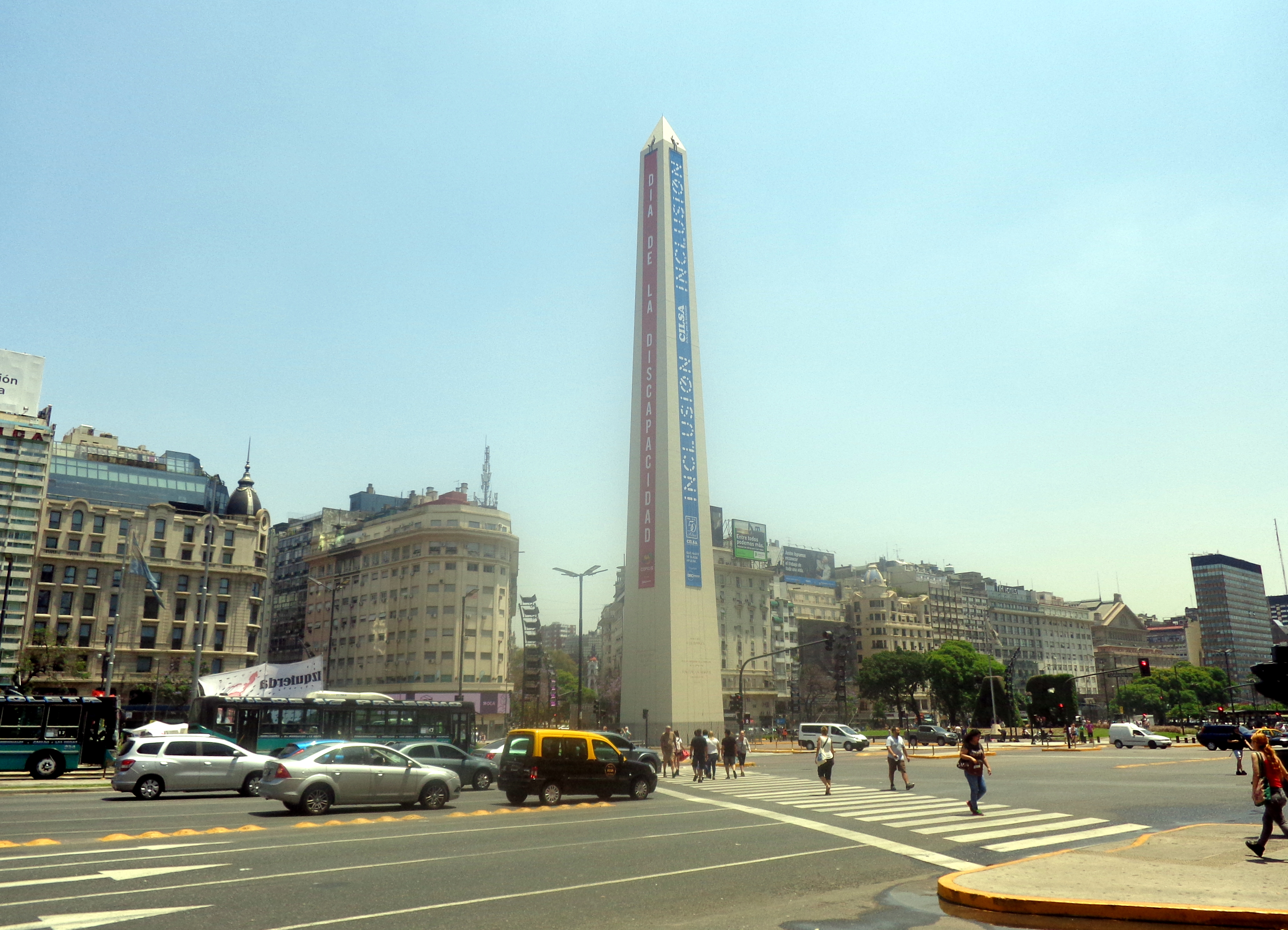 Obelisco de Buenos Aires decorado para recordar el Día Internacional de la Discapacidad.